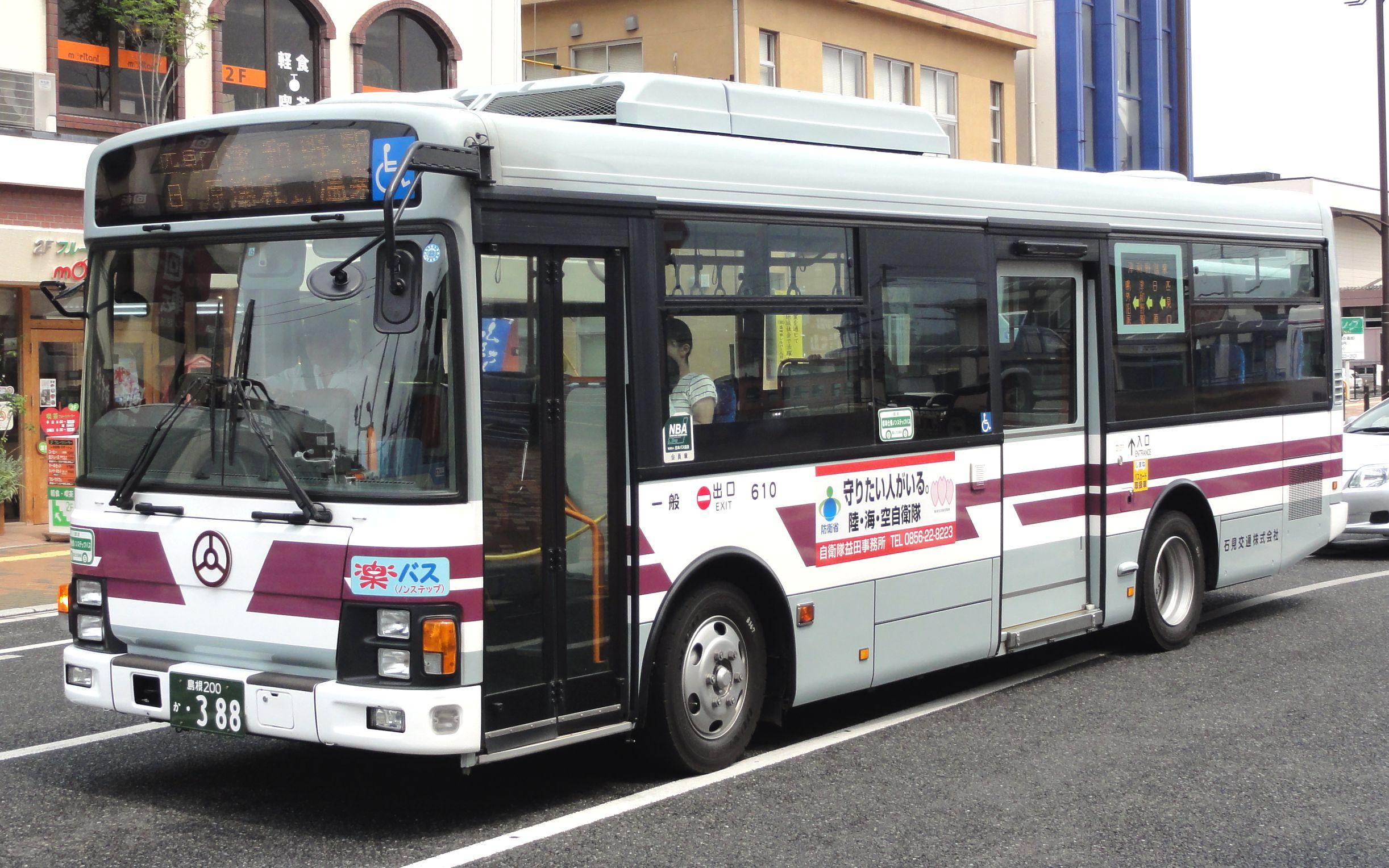 石見交通 路線バス